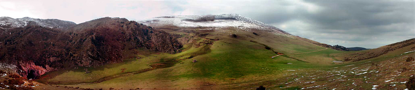 Campera y cueva de Cuevallagar en el concejo Asturiano de Yernes y Tameza.